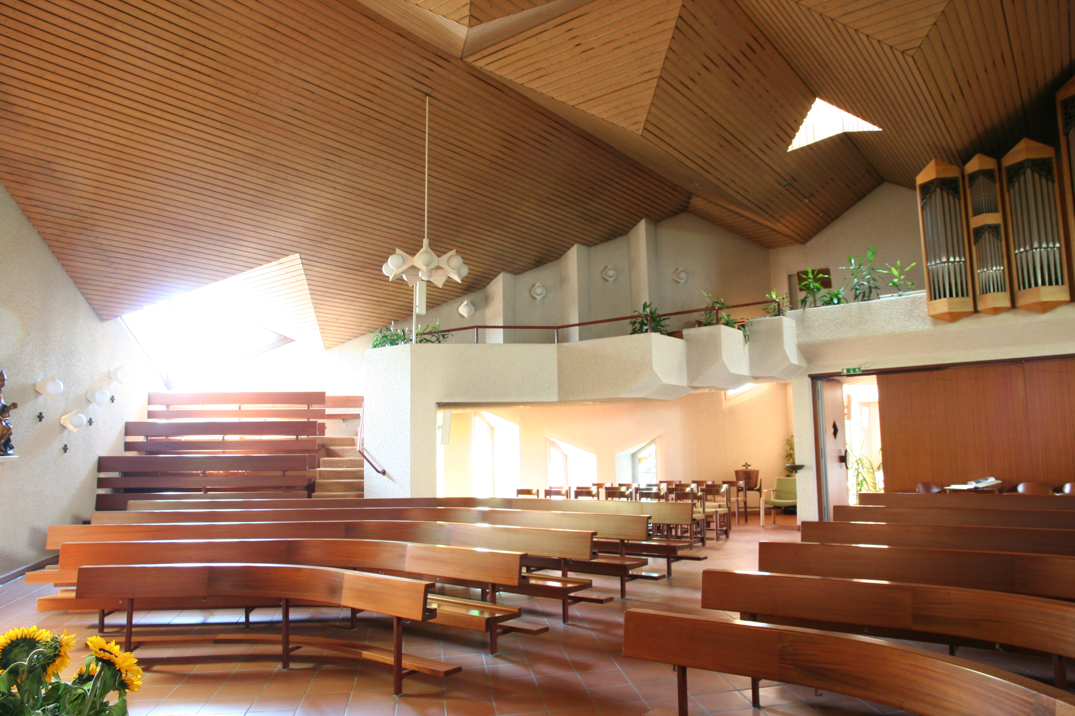 Römisch-katholische Kirche St. Nikolaus Rüschlikon, Blick gegen Süden